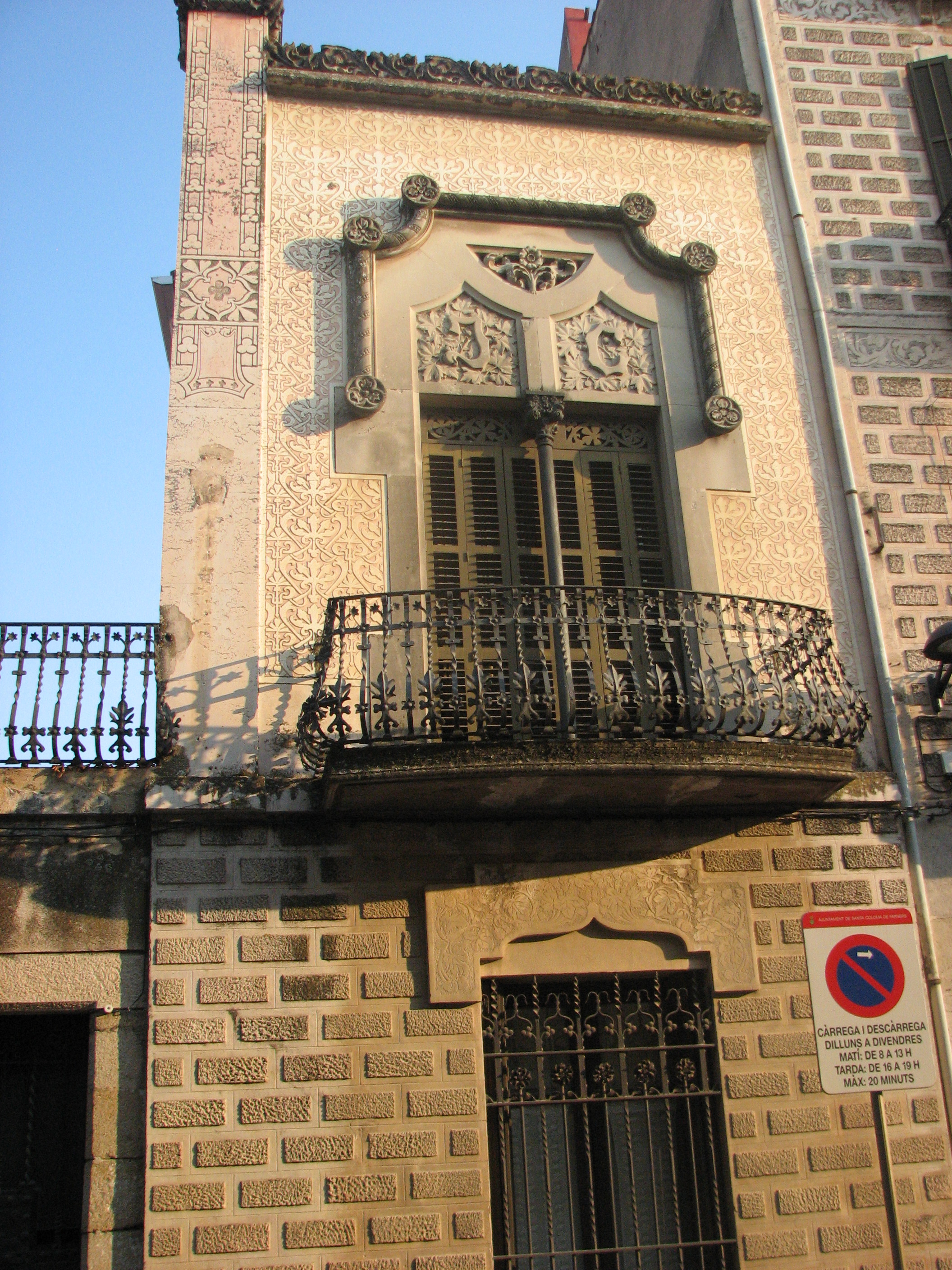 Can Muxac (Santa Coloma de Farners)